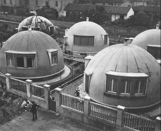 Milano, le case a igloo alla Maggiolina, opera dell'architetto Mario Cavallè